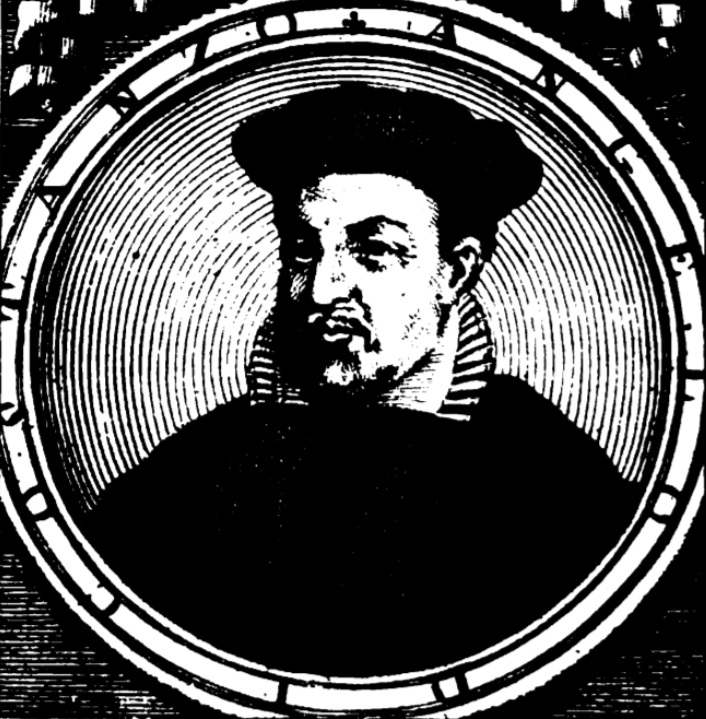 Ritratto dello storico e poeta Angelo Di Costanzo